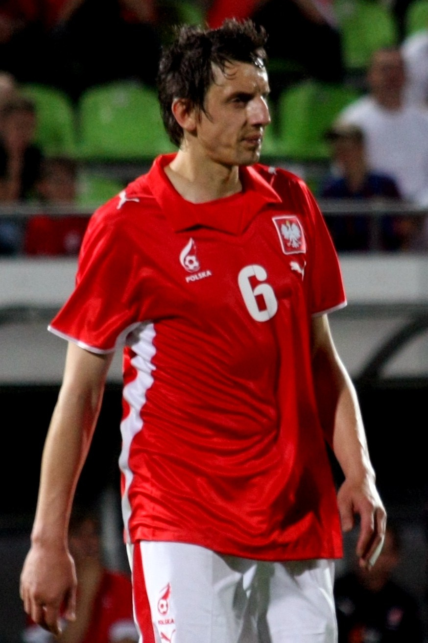 Jacek Bąk, piłkarz. Mecz Polska kontra Albania (27.05.2008).